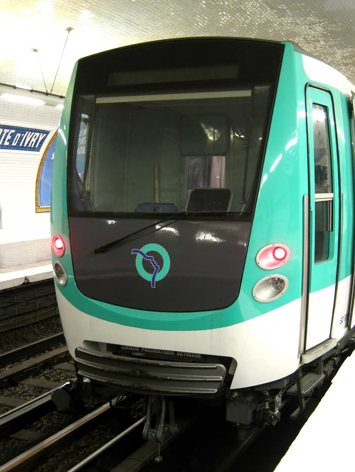 Description : Metro de Paris Rame de la serie MF2000 (prototype) Face avant de la rame Station Porte d'Ivry, Journées du Patrimoine Lieu : Paris, France Date : Septembre 2006 Auteur : Pline photo personnelle